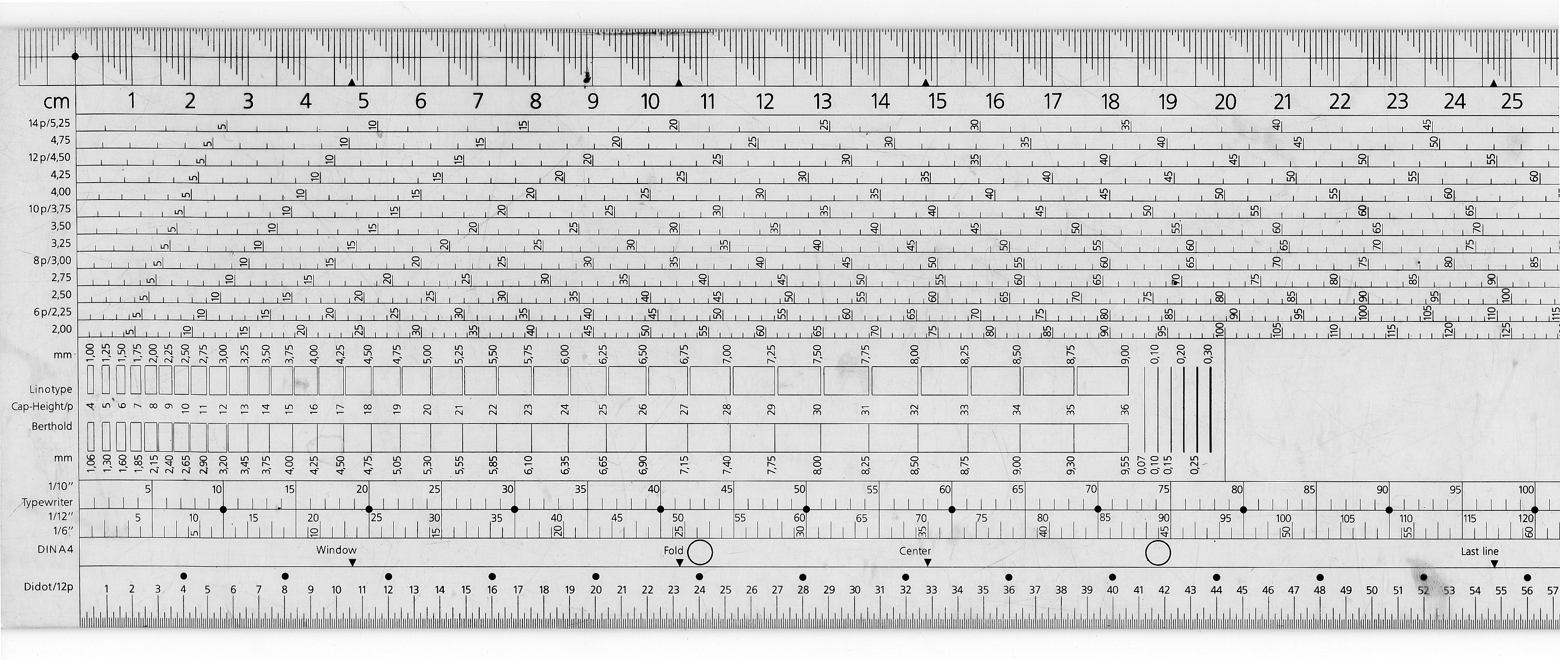 DTP-Typometer